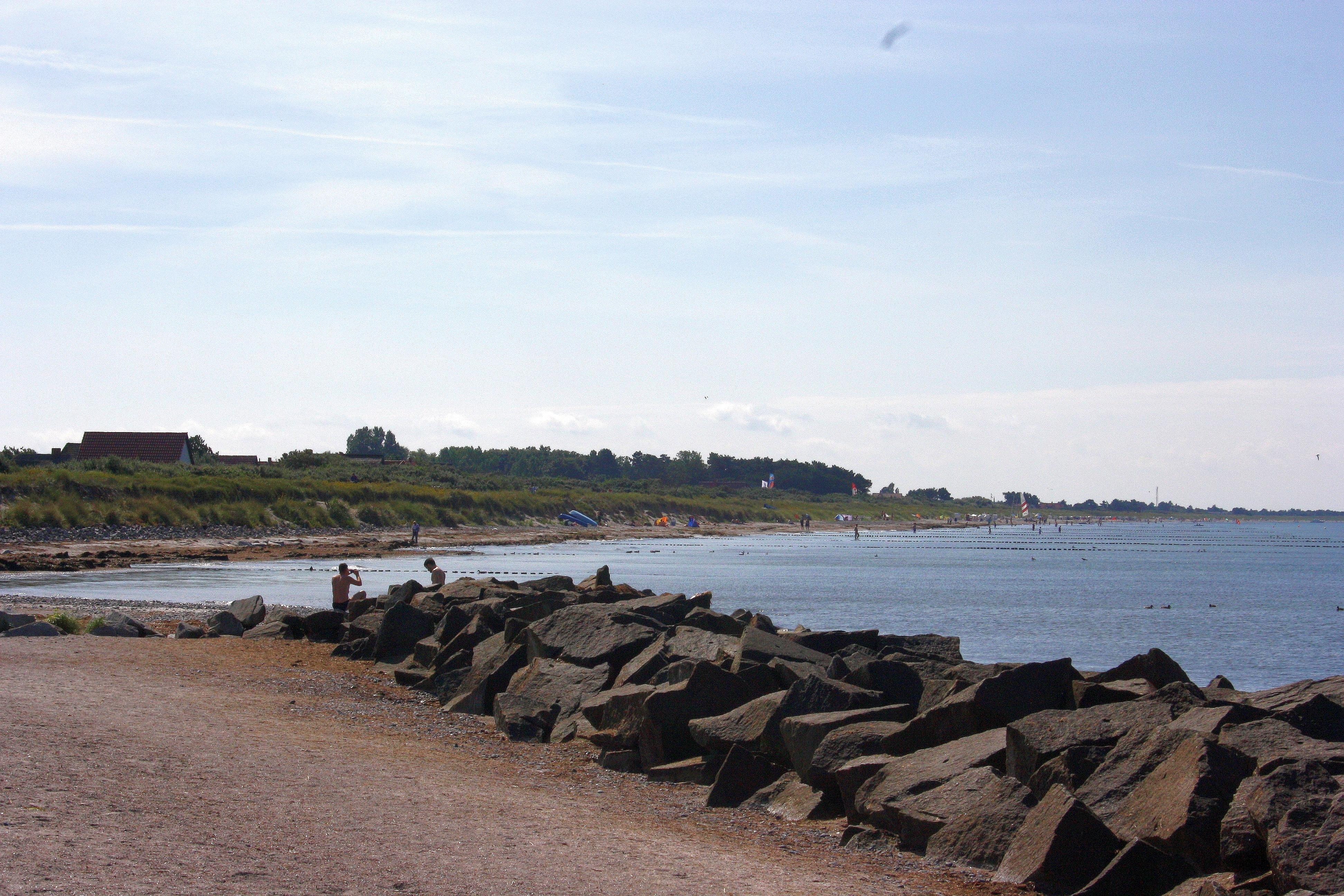 Ostseeinsel Hiddensee - Westseite Strand bei Vitte